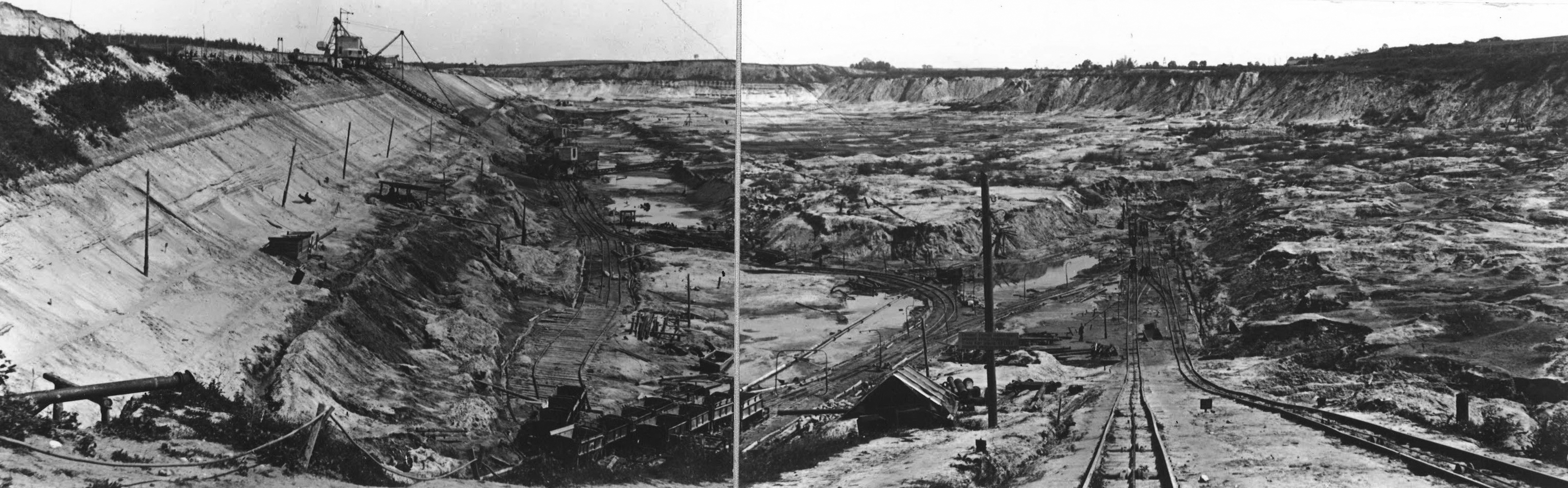 Карьер Вальтер Калининградского янтарного комбината после восстановления, фото после 1947 года.